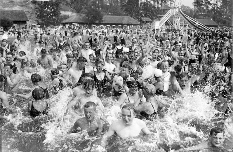 Momentbilder bei 30 Grad Hitze! Tausende von Badelustigen tummeln sich in den kühlen Fluten des Wannsees.